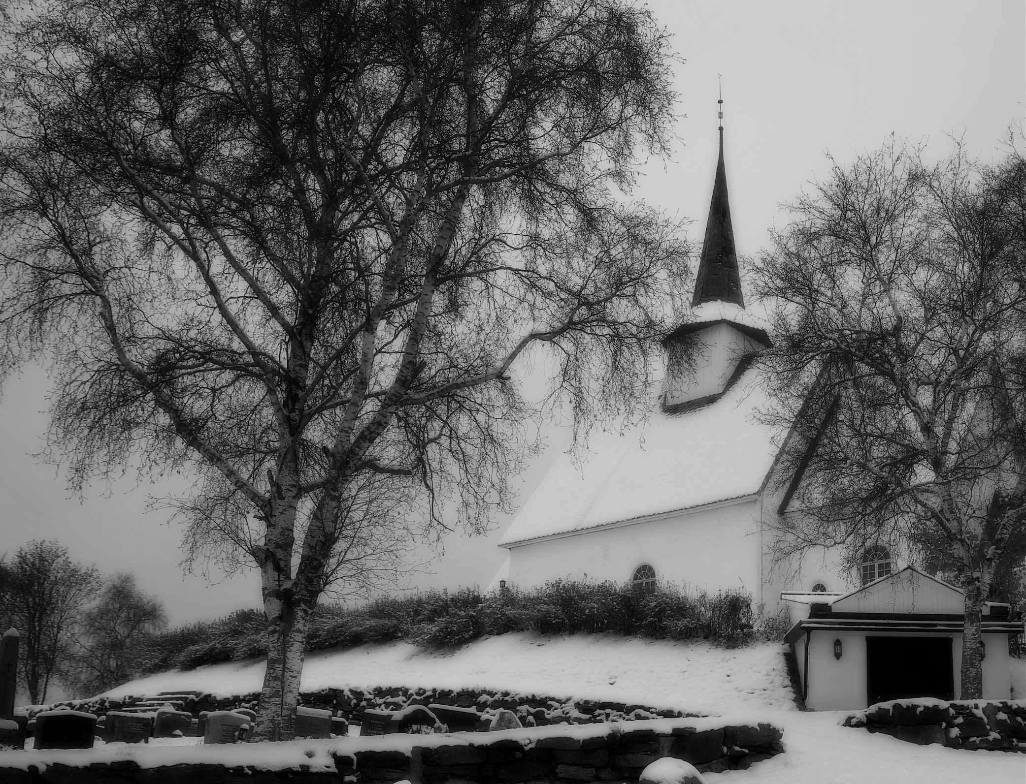 Ulnes kyrkje i Nord-Aurdal kommune i Oppland